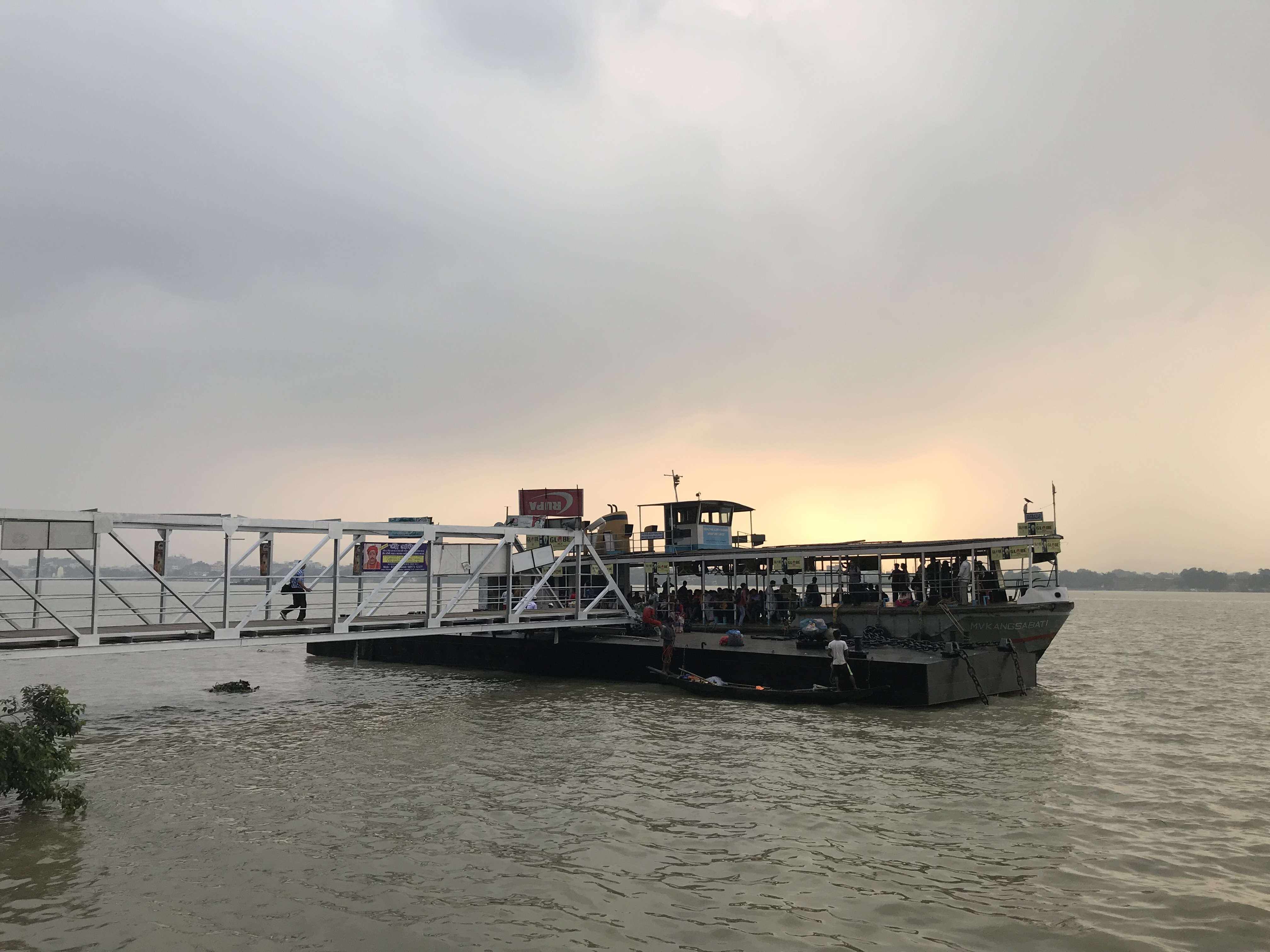 Bagbazar Launch Ghat in Kolkata.